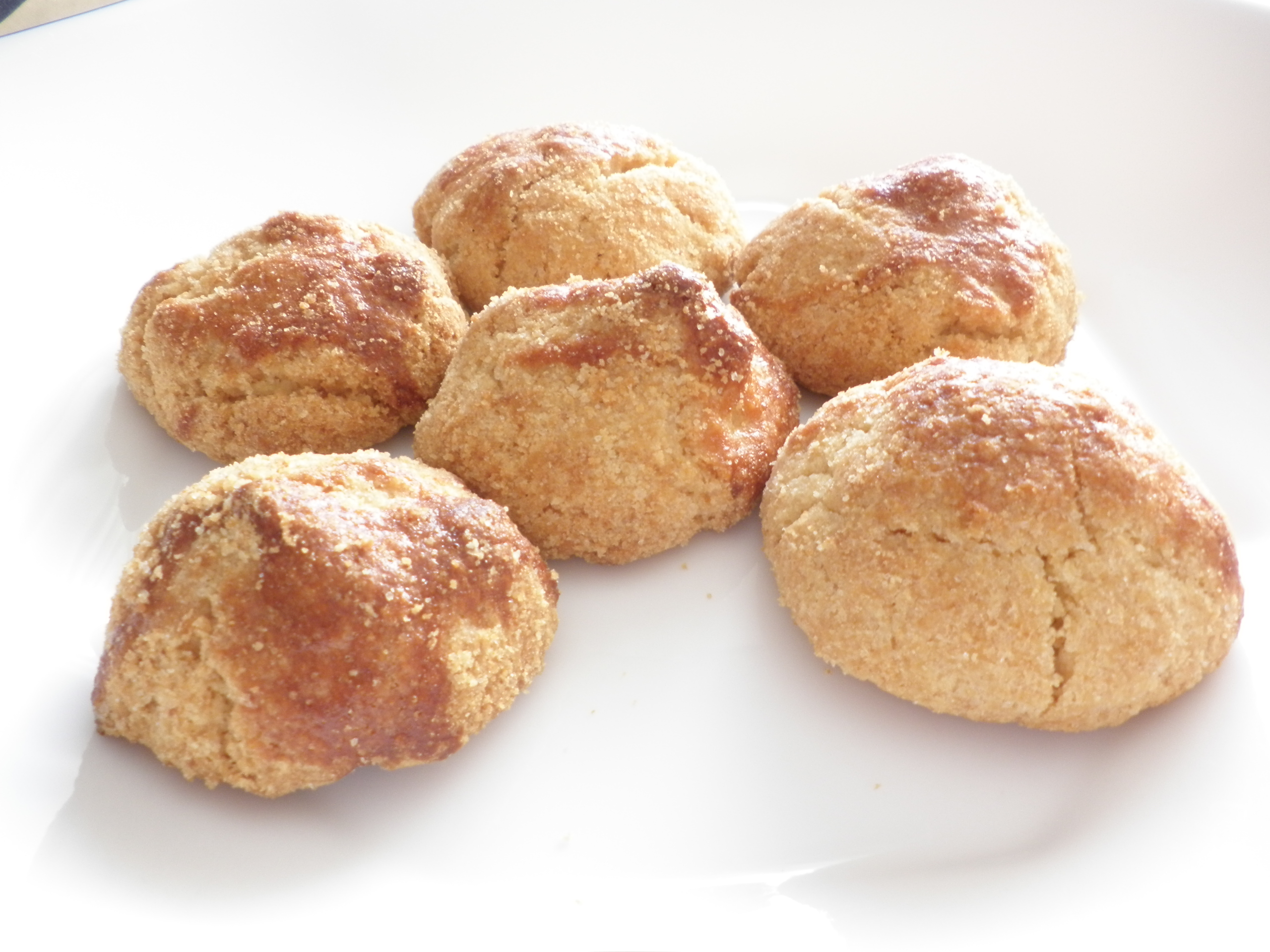 Aceitada, producto gastronómico de Zamora